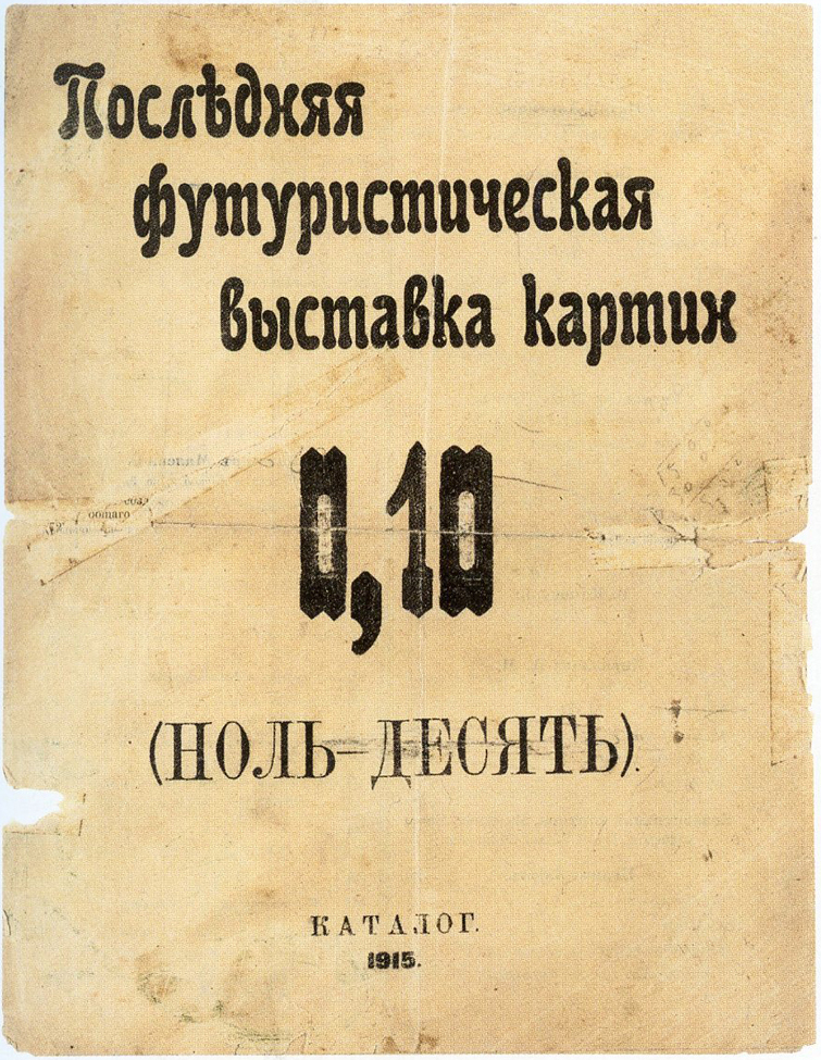 каталог выставки 0,10